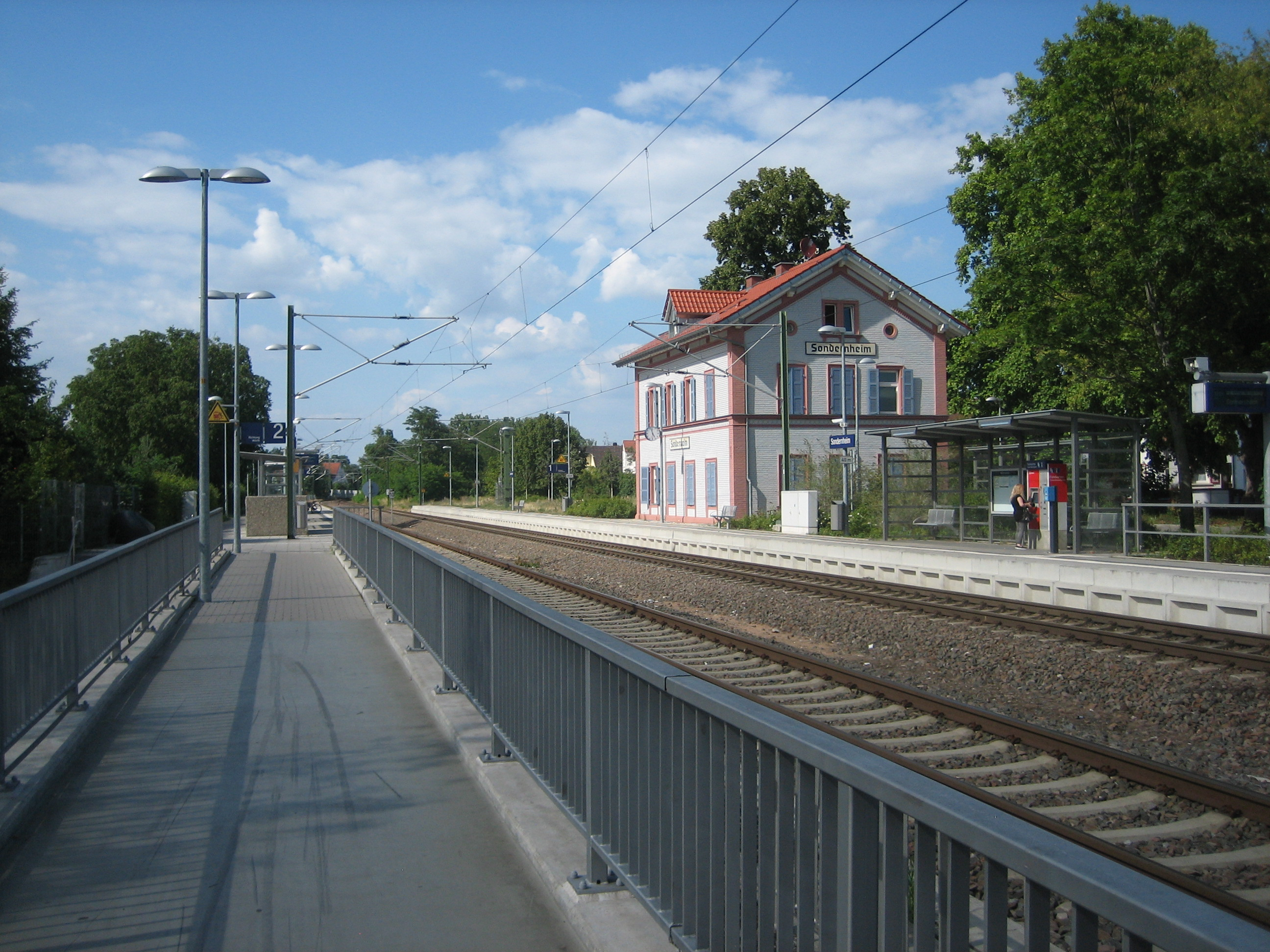 Bahnhof Sondernheim, Blick Richtung Norden